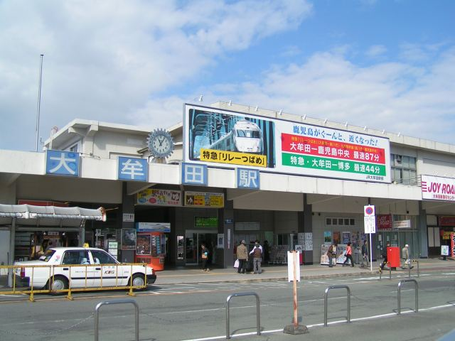 大牟田駅東口 投稿者が撮影(2005/11/16)